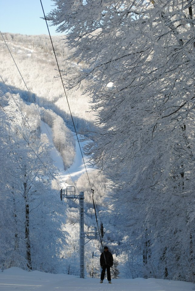 Prat Peyrot